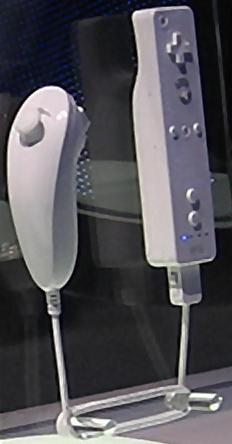 Комлект контроллеров для игровой системы Wii: Wii Remote и Nunchuck